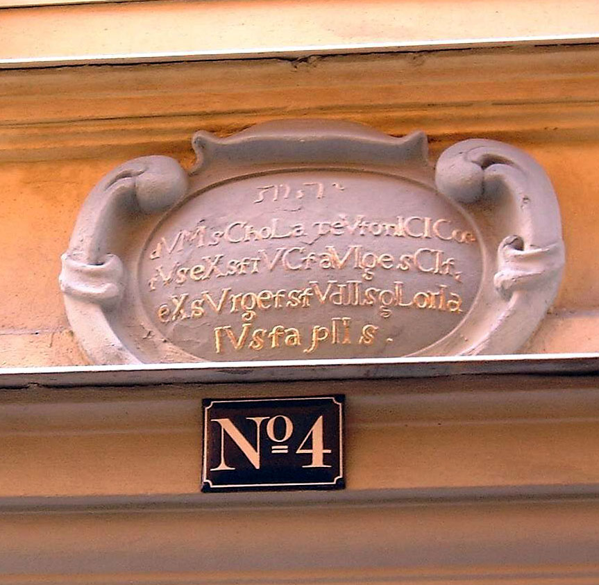 Cartouche at 4, Tyska Skolgränd, Gamla stan, Stockholm. Cropped.